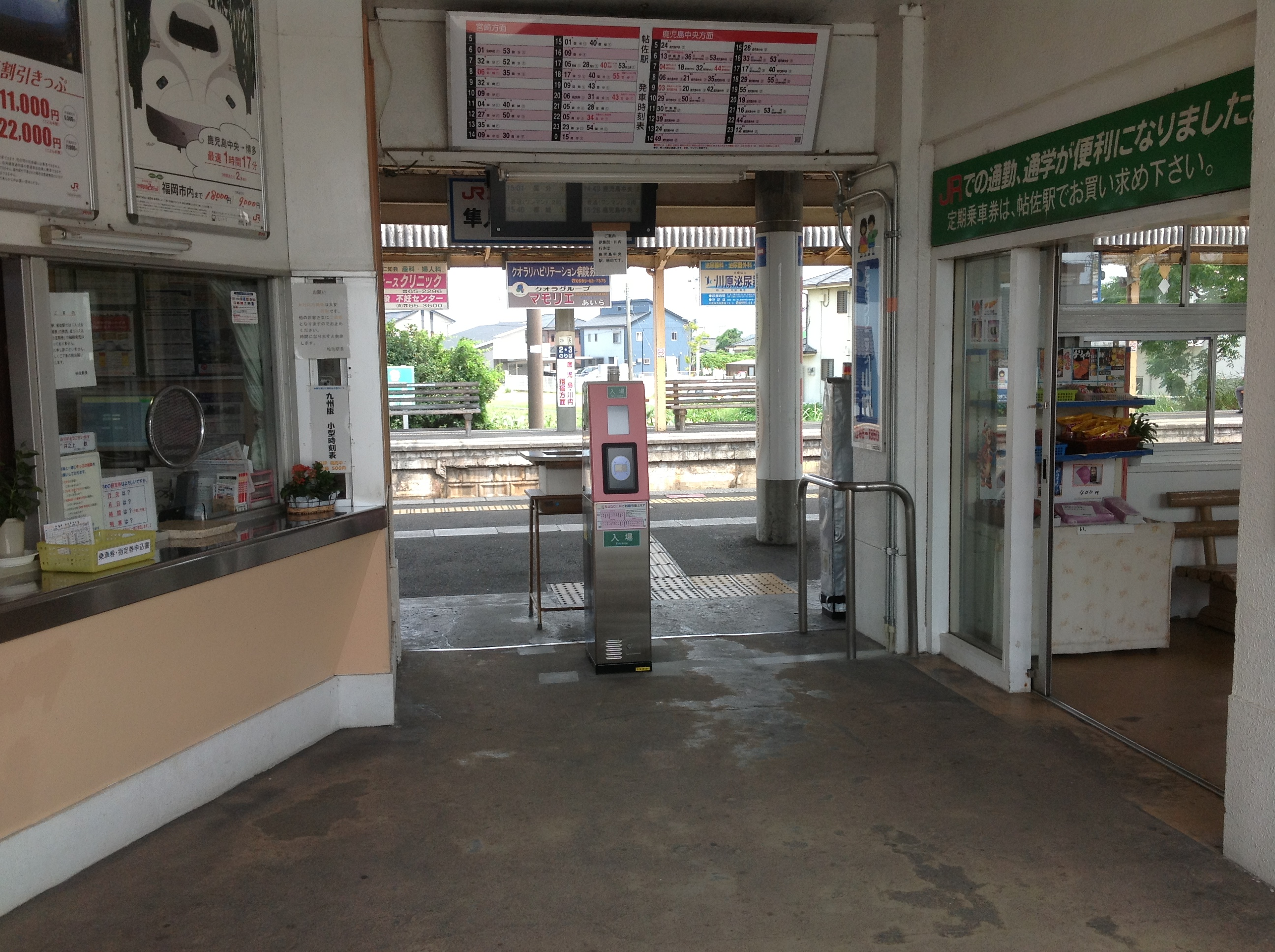 帖佐駅駅舎内